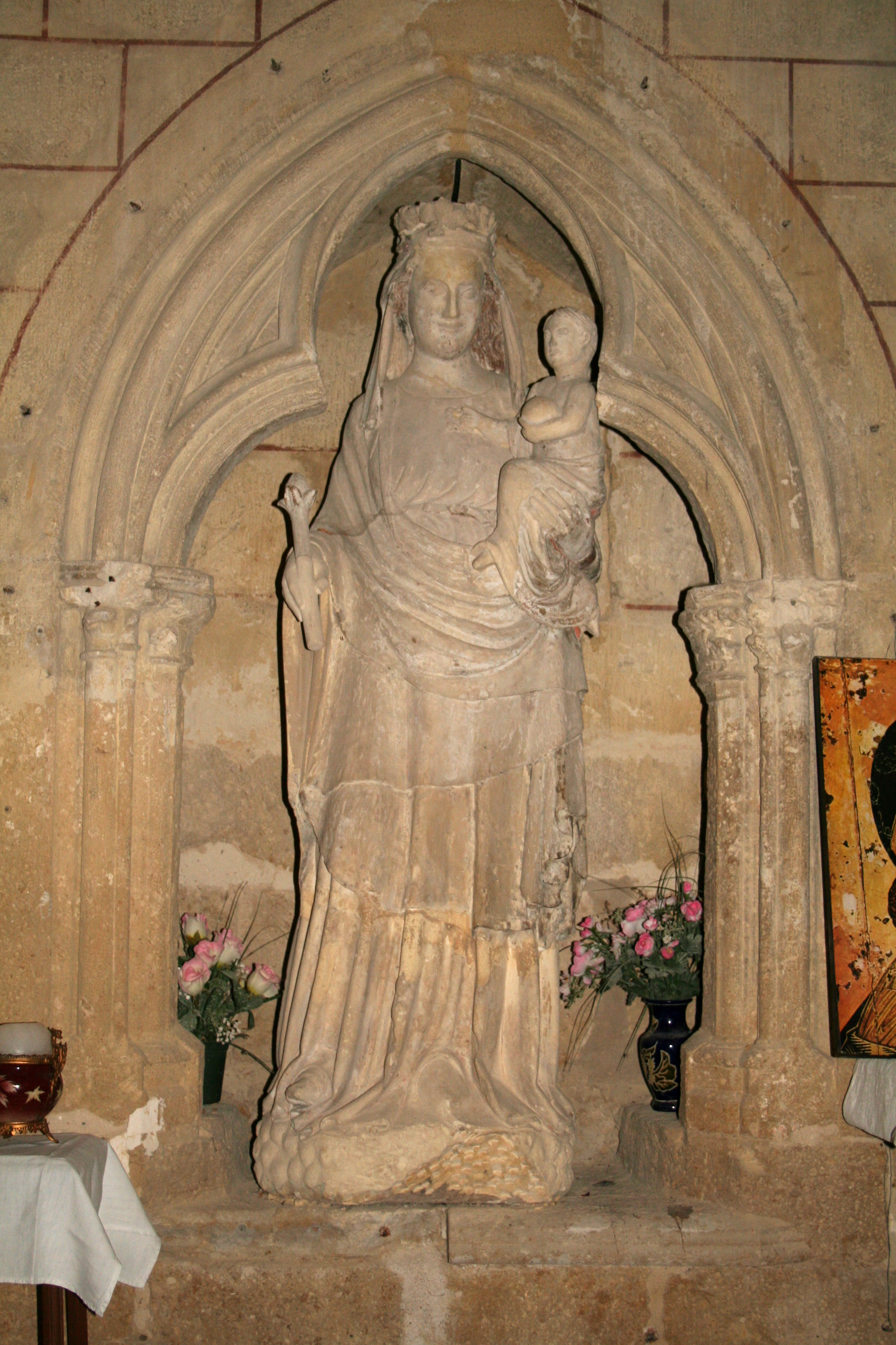 Collégiale d'Uzeste (33) 13th century, 14th century, 19th century Madonna and Child, 14th century